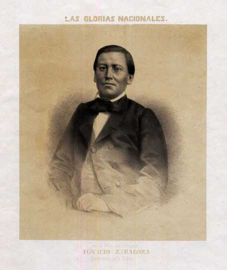 General de División, Ignacio Zaragoza. 1862. Constantino Escalante. Forma parte de la carpeta 'Las Glorias Nacionales. Álbum de la Guerra'. BNAH-INAH.